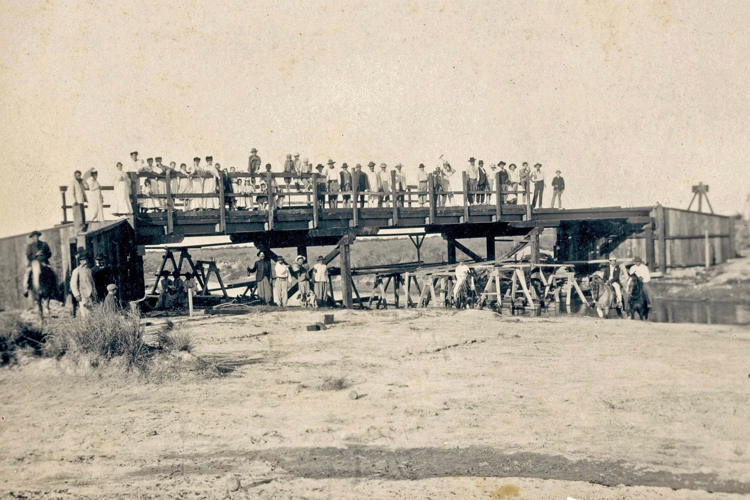 Ilustración de la construcción del puente. Foto tomada por Hugo R. Hülsberg